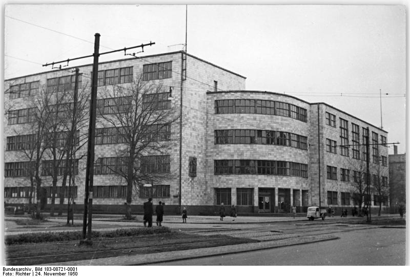 Berlin, Köpenick, "Eichendorf-Schule" Illus Richter 24.11.50 2 Jahre demokratischer Magistrat. Am 30.1.50. Den 2. Jahrestag des demokratischen Magistrats in Berlin, wird die Eichendorf-Schule in Köpenick, die bisher als Krankenhaus benutzt wurde, wieder ihrer ursprünglichen Bestimmung als Schule übergeben.